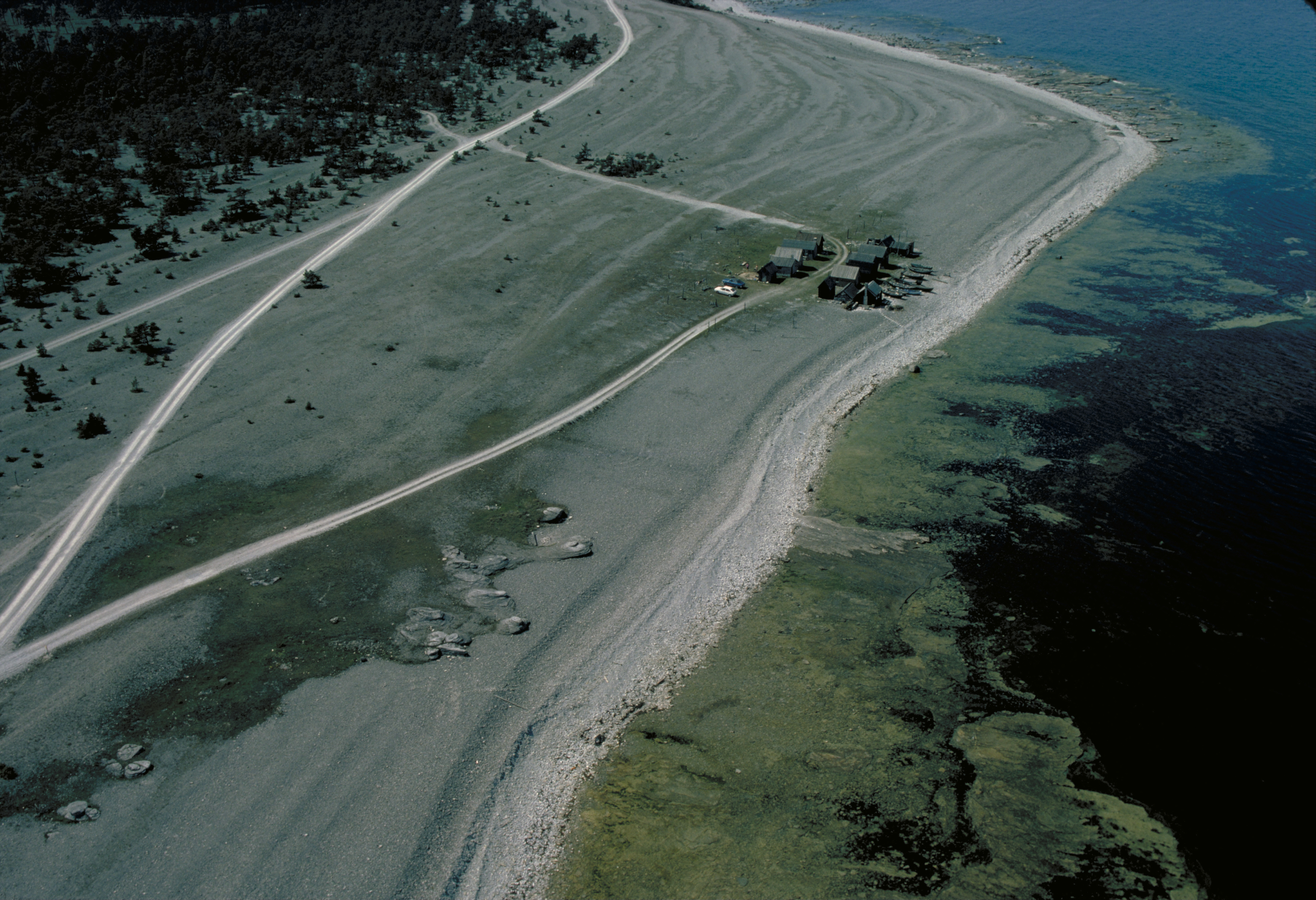 Bilden troligen från mitten av 1960-talet. Motiv: Digerhuvud Nyckelord: Flygbilder, Naturreservat, Riksintressen Kategori: Kust- och skärgårdsmiljö Bilden troligen från mitten av 1960-talet.